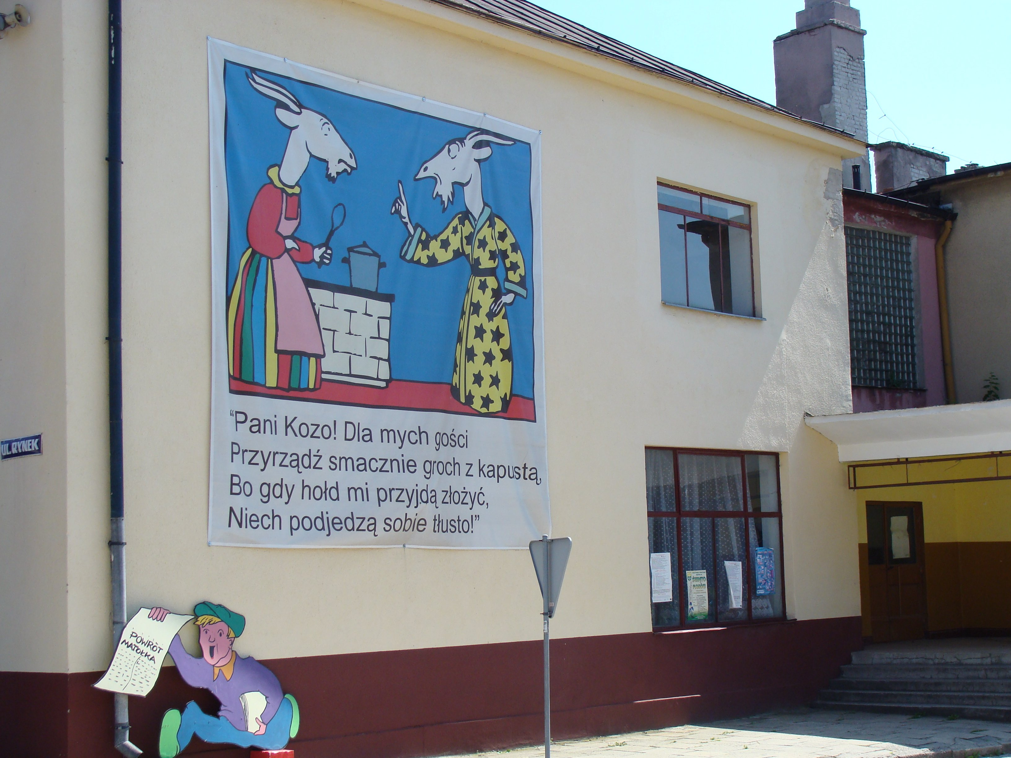 Koziołek Matołek w Pacanowie